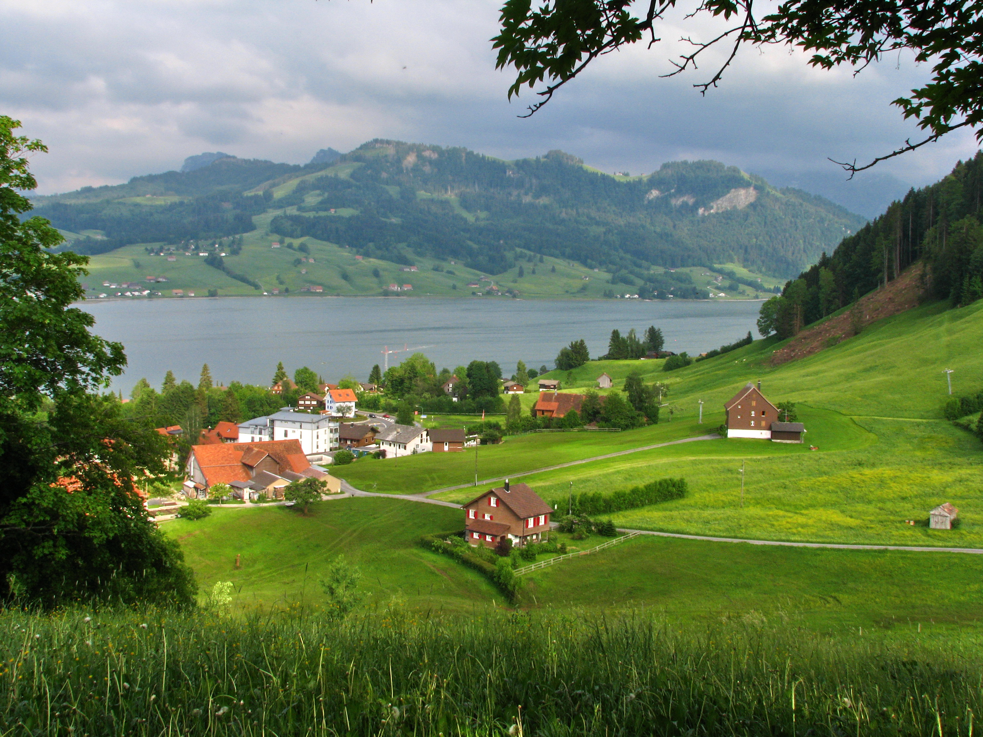 Sihlsee in Einsiedeln (SZ) in Switzerland